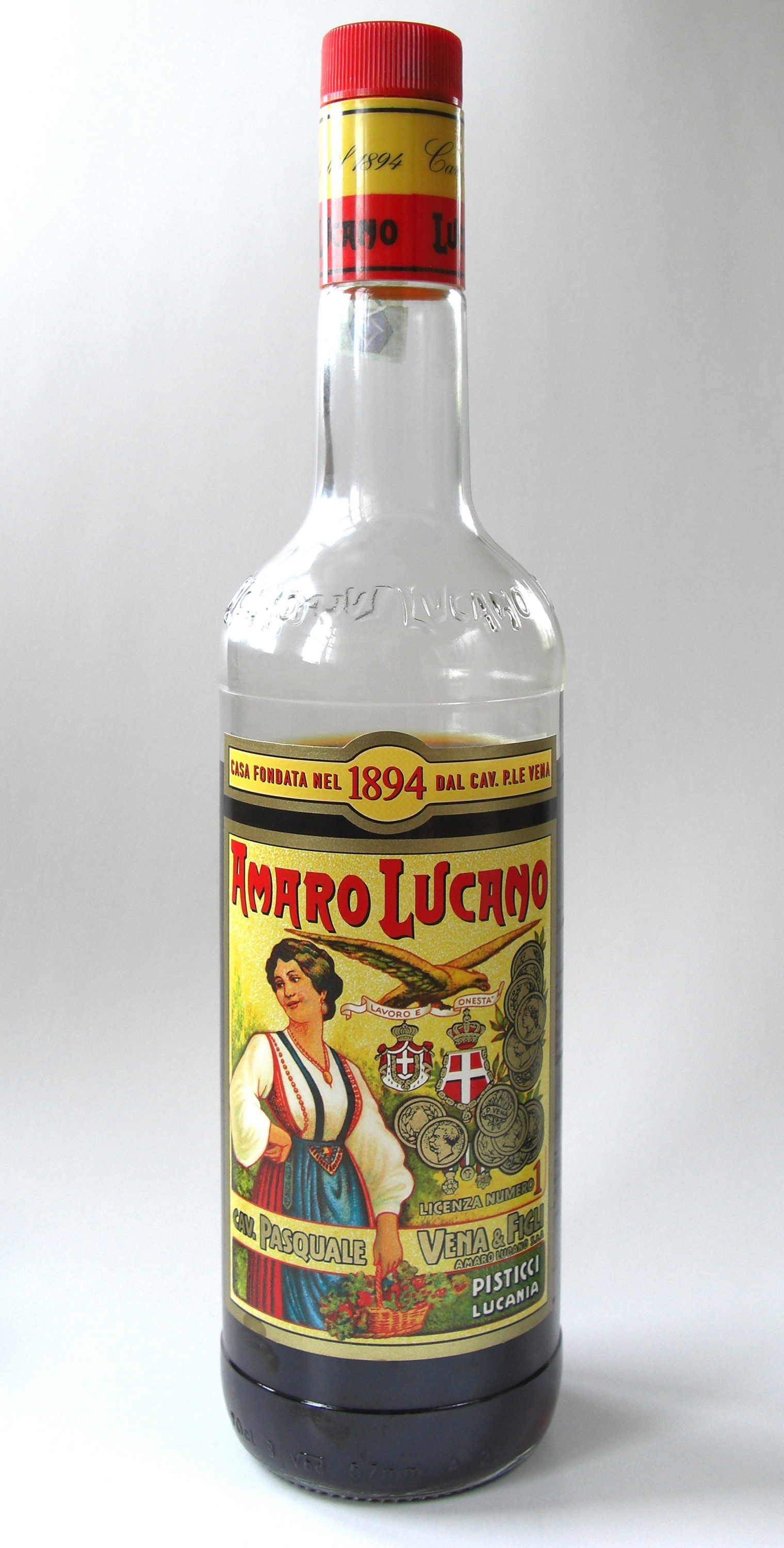 See title